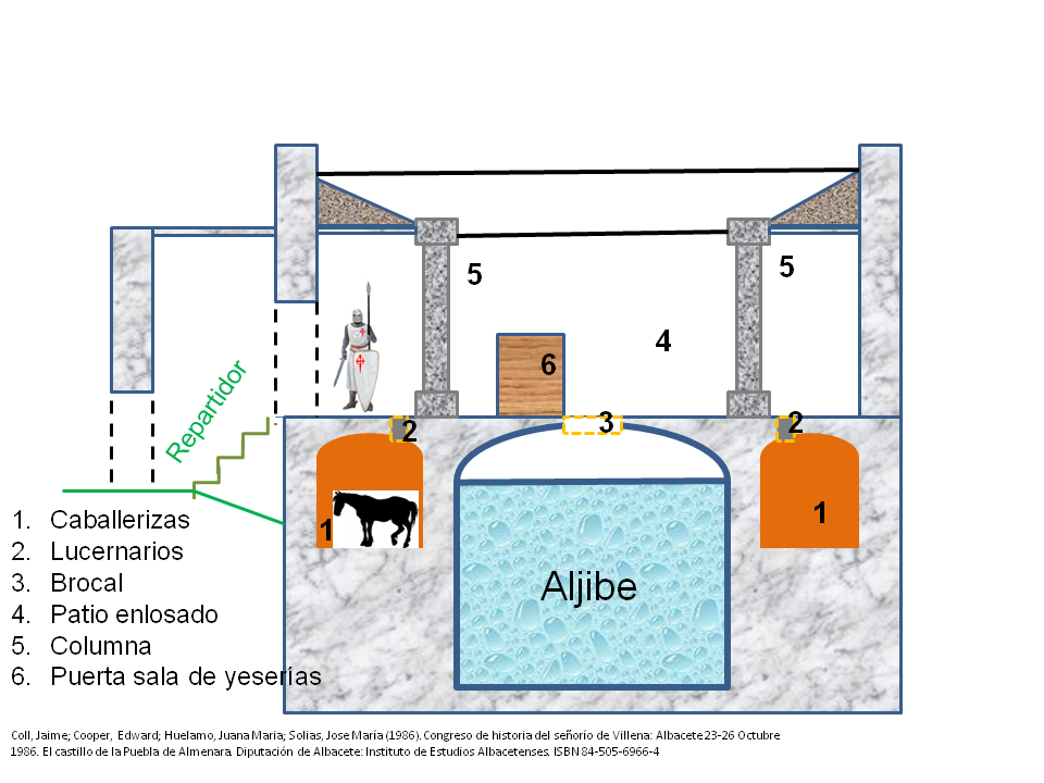 Croquis sección interior del castillo de Puebla de Almenara Cuenca.